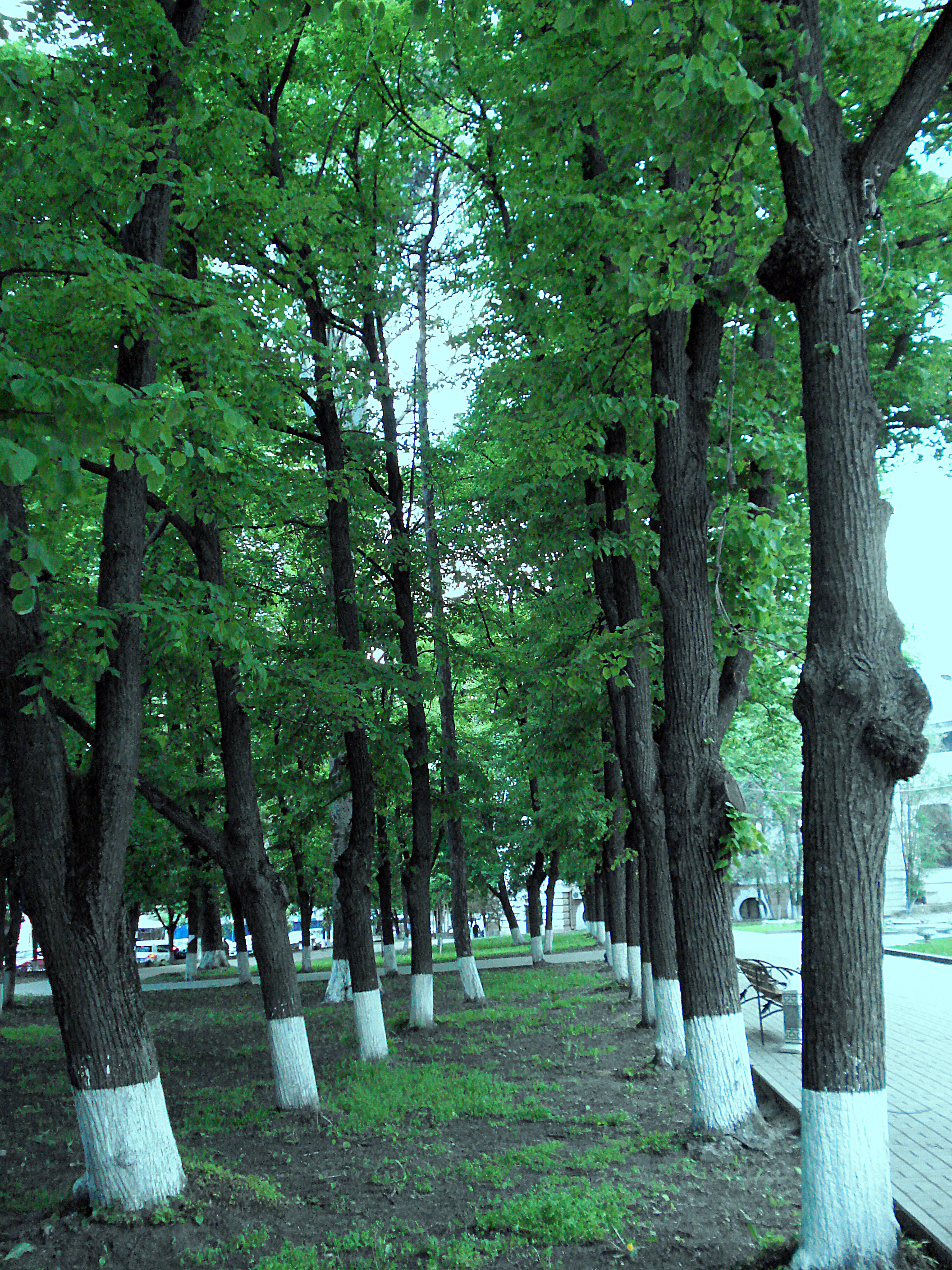 Летний сад (парк им. 1 Мая): улица Большая Садовая / переулок Крепостной, Ростов-на-Дону, Ростовская область